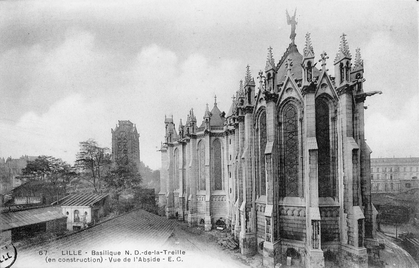 Basilique Notre-Dame de la Treille à Lille (en construction) : Vue de l'Abside en 1900.Campanile Saint Nicolas à gauche (1874)